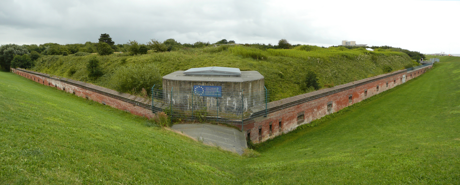 Fort Kugelbake mit Scheinwerferbunker